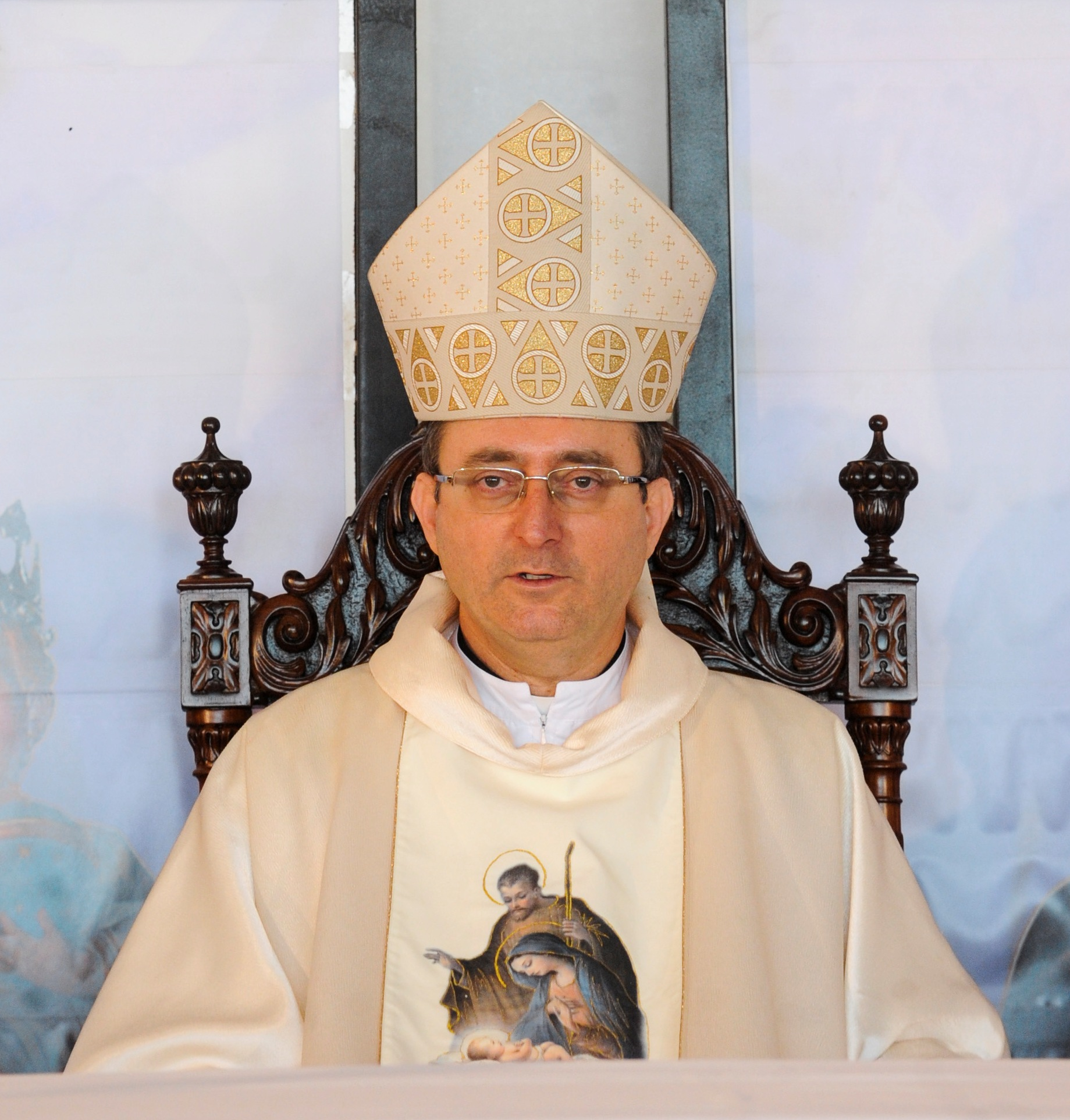 Arcebispo de Brasília Sérgio da Rocha, em missa realizada no Senado Federal.